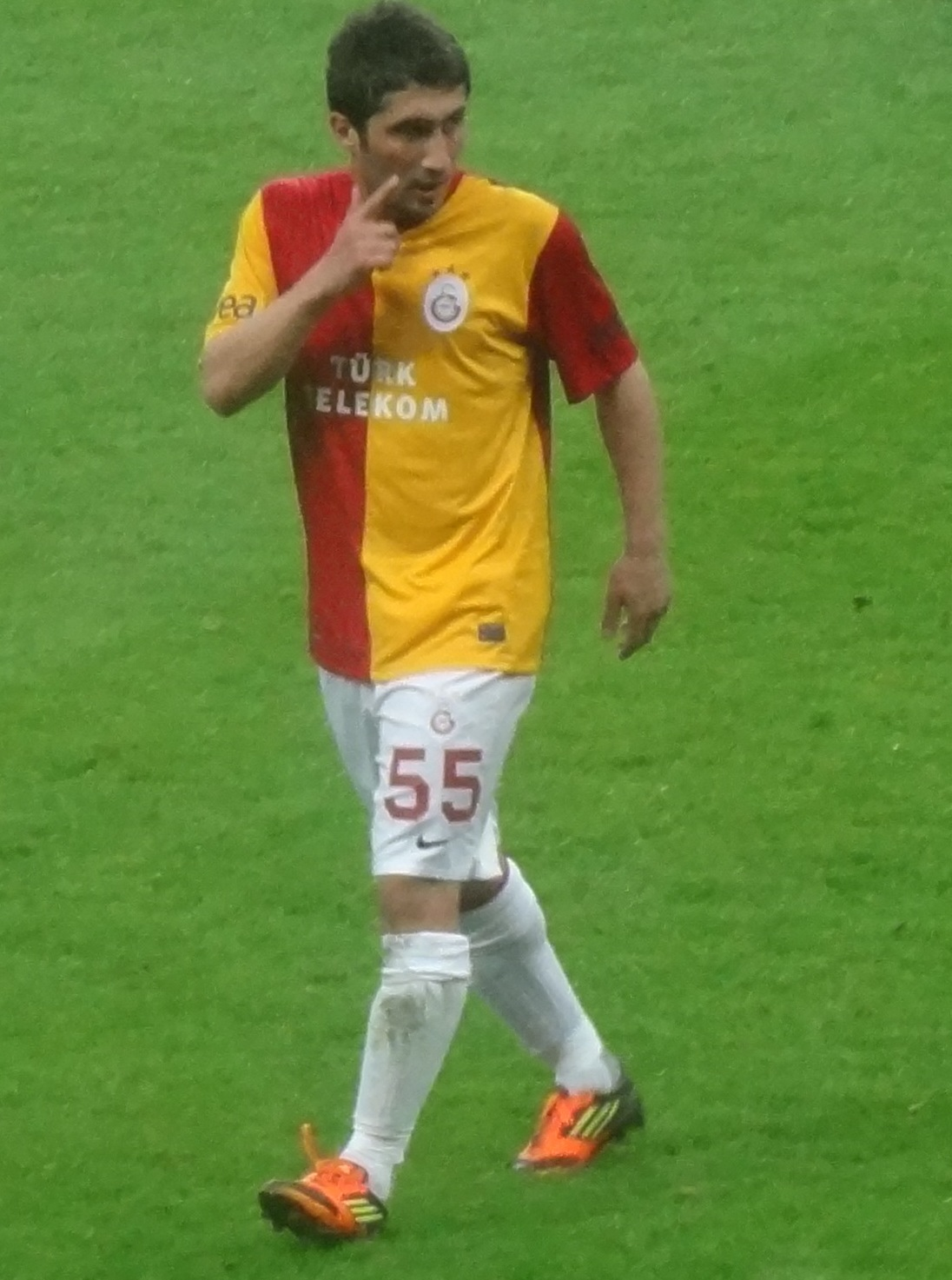 Sabri gol attığı maçta